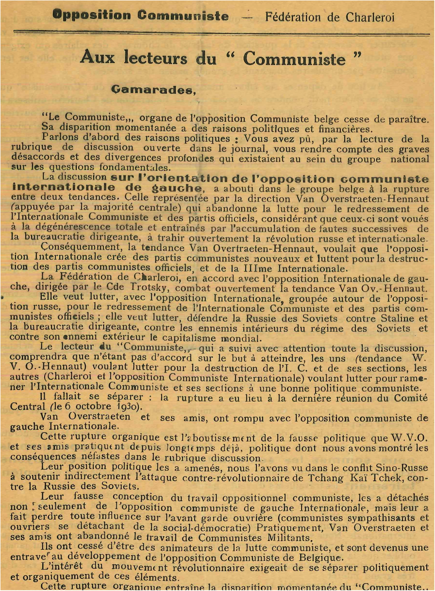 Extrait de Tract édité en 1930 par la Fédération de Charleroi dirigée par Léon Lesoil